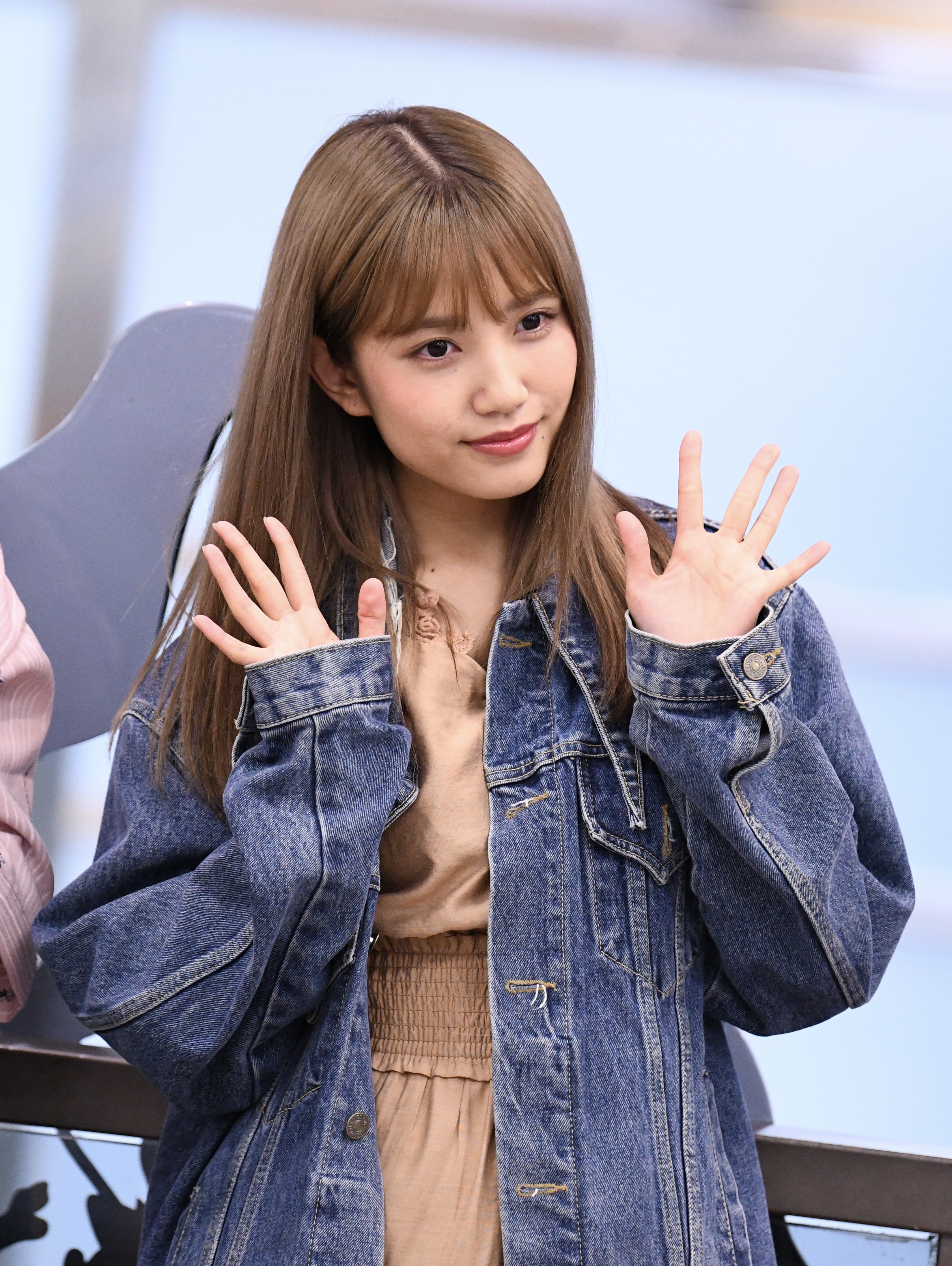 AKB48 加藤玲奈